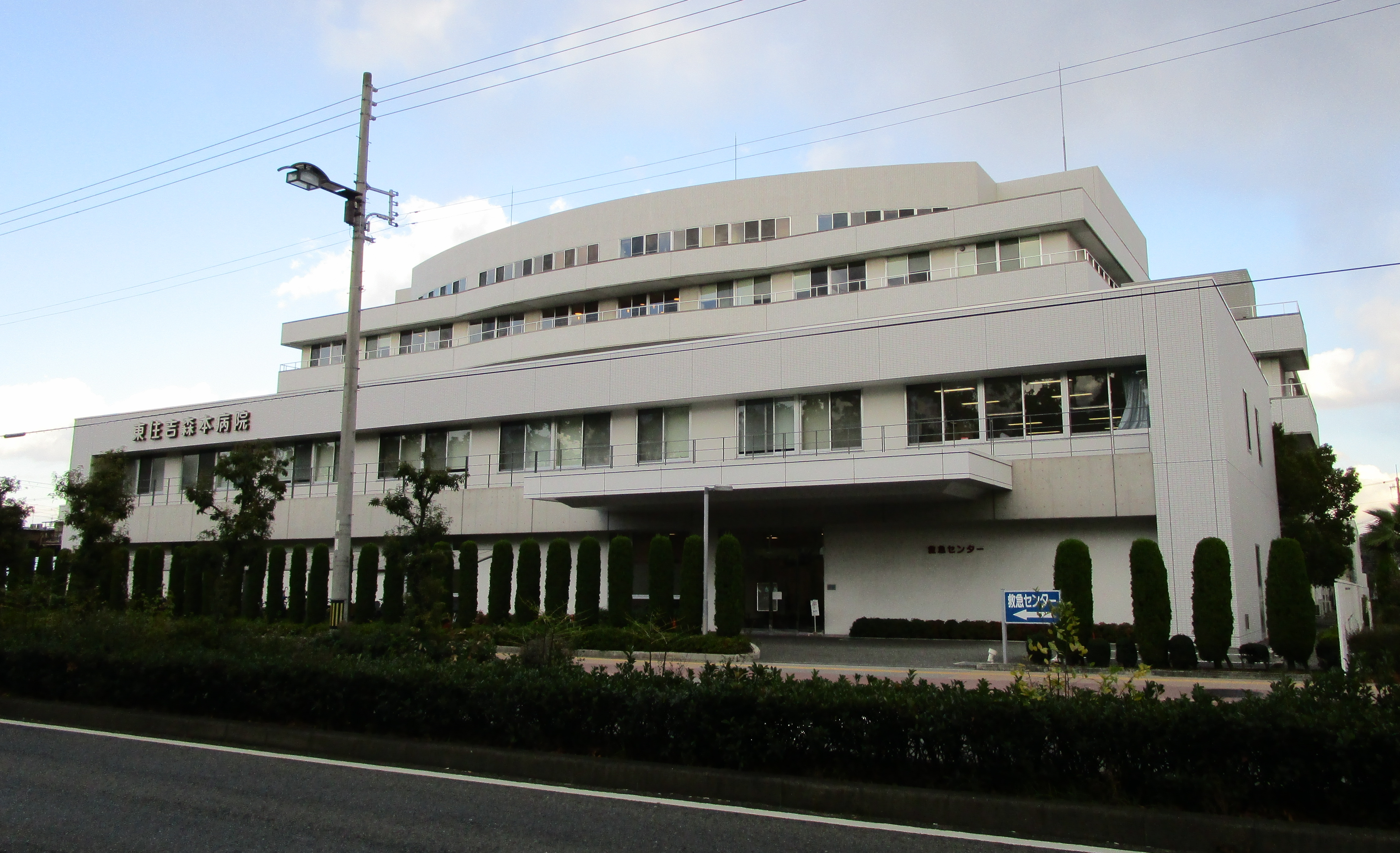 東住吉森本病院